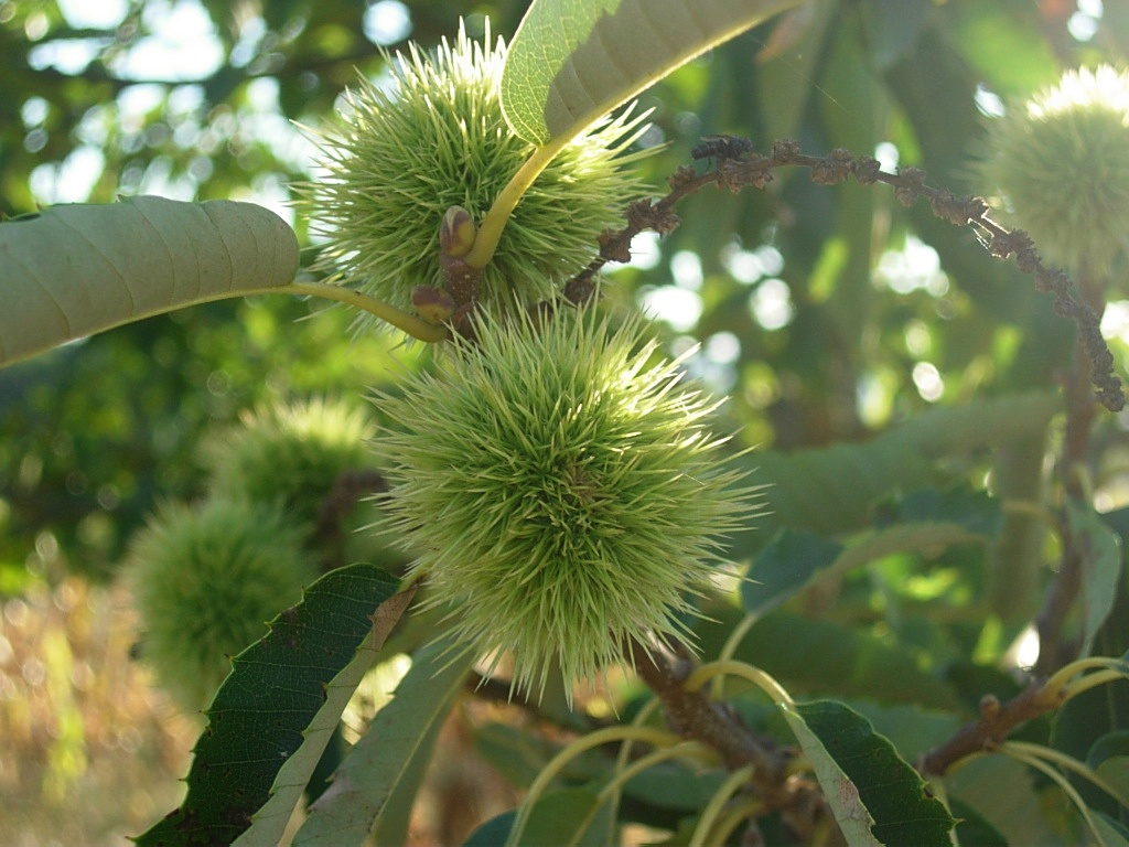 Cáscara de la castaña.